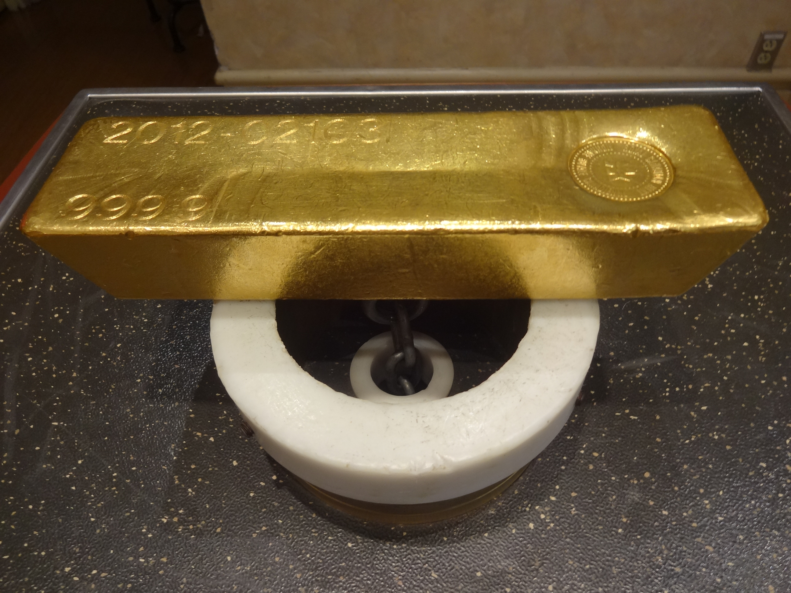 Barra de ouro no Royal Canadian Mint, em Ottawa.